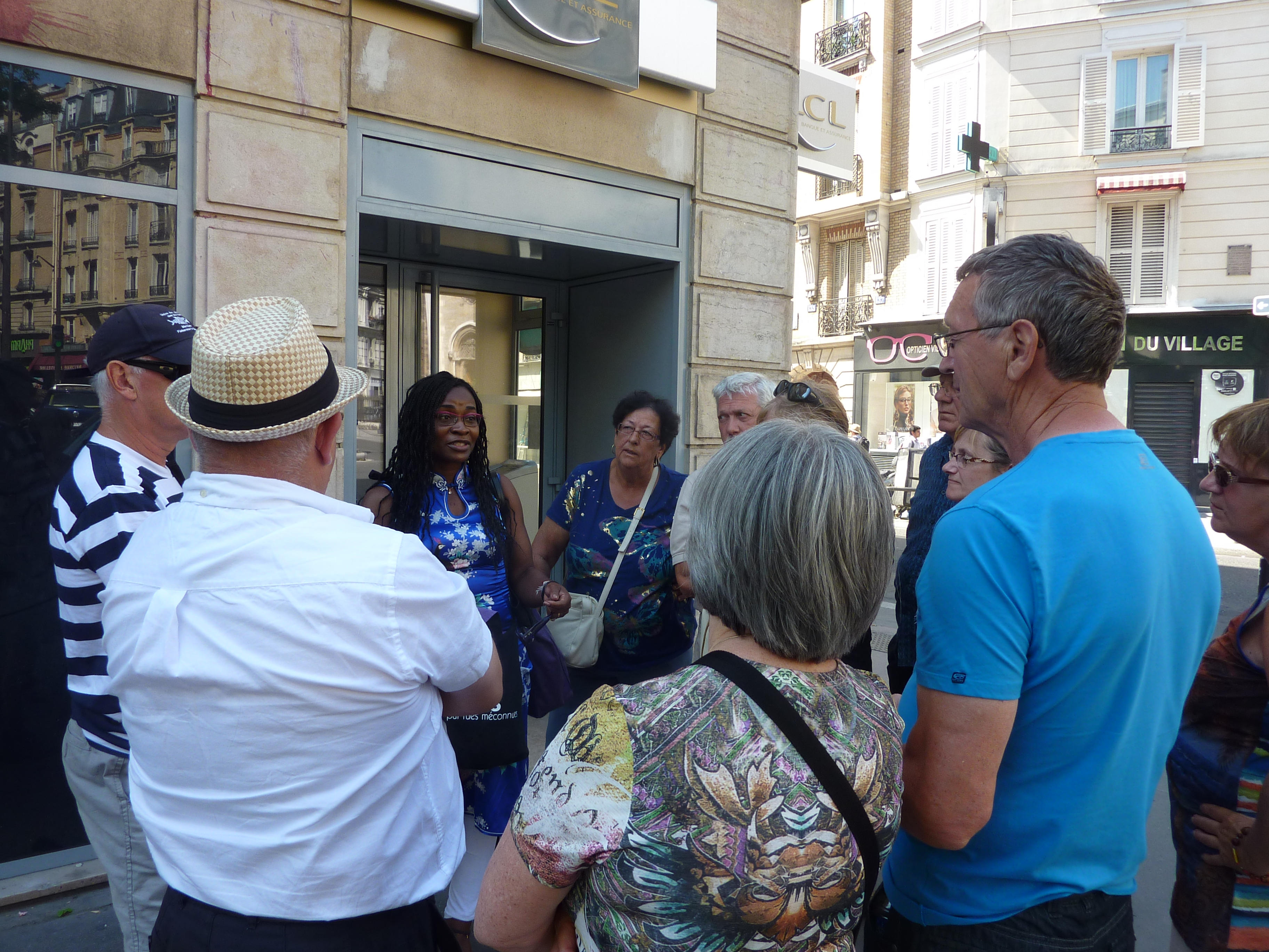 Angénic Agnero avec un groupe.